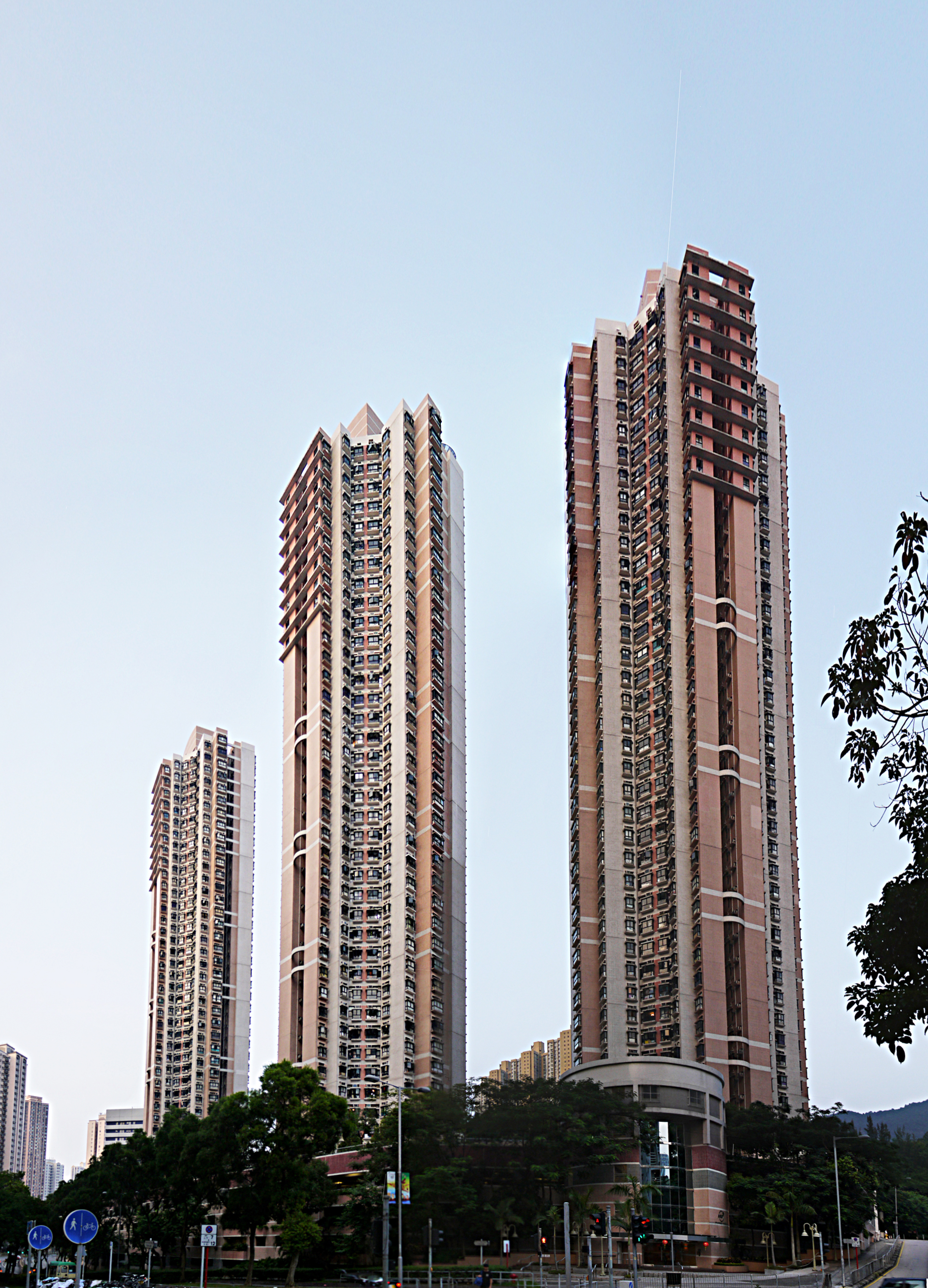 中文（香港）: 夾心階層住屋計劃---雅景臺